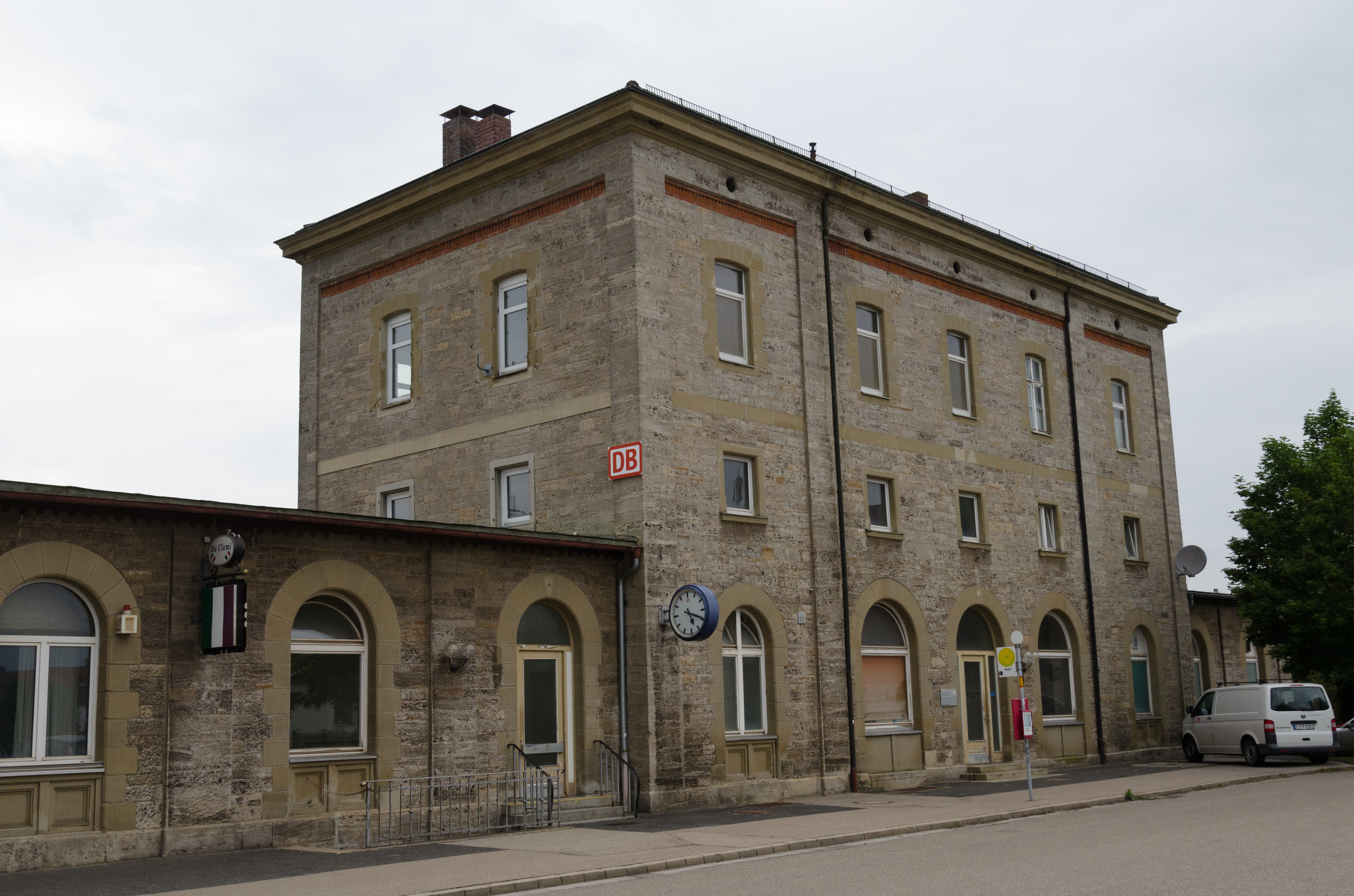 Gallmersgarten, Steinach bei Rothenburg ob der Tauber, Bahnhofstraße 21